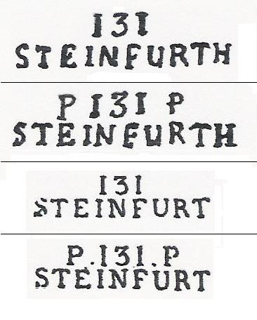 Beispiele für Portsstempel selber kopiert und geschönt 1988 W.Steven